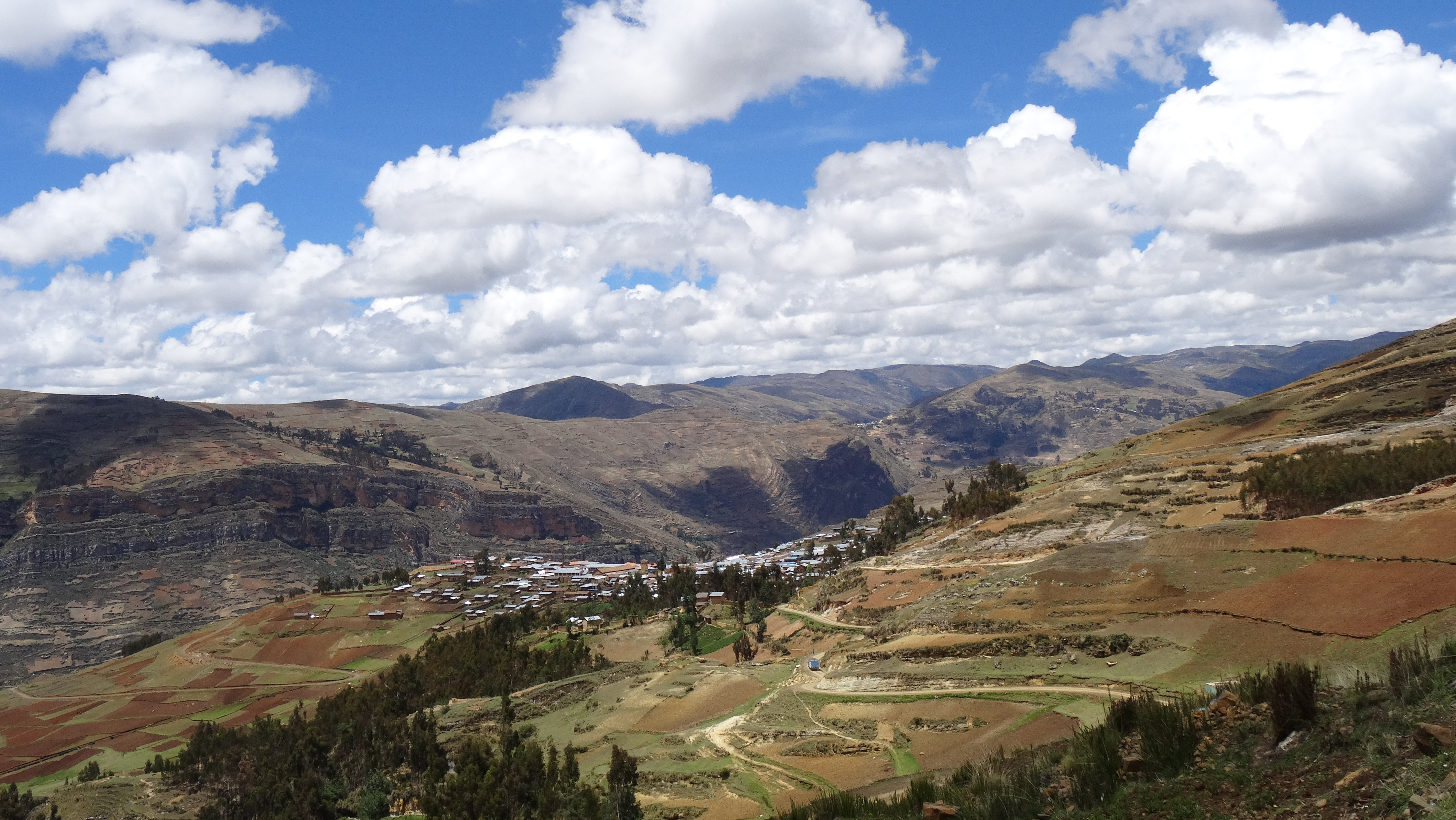 Miraflores desde la bajada.